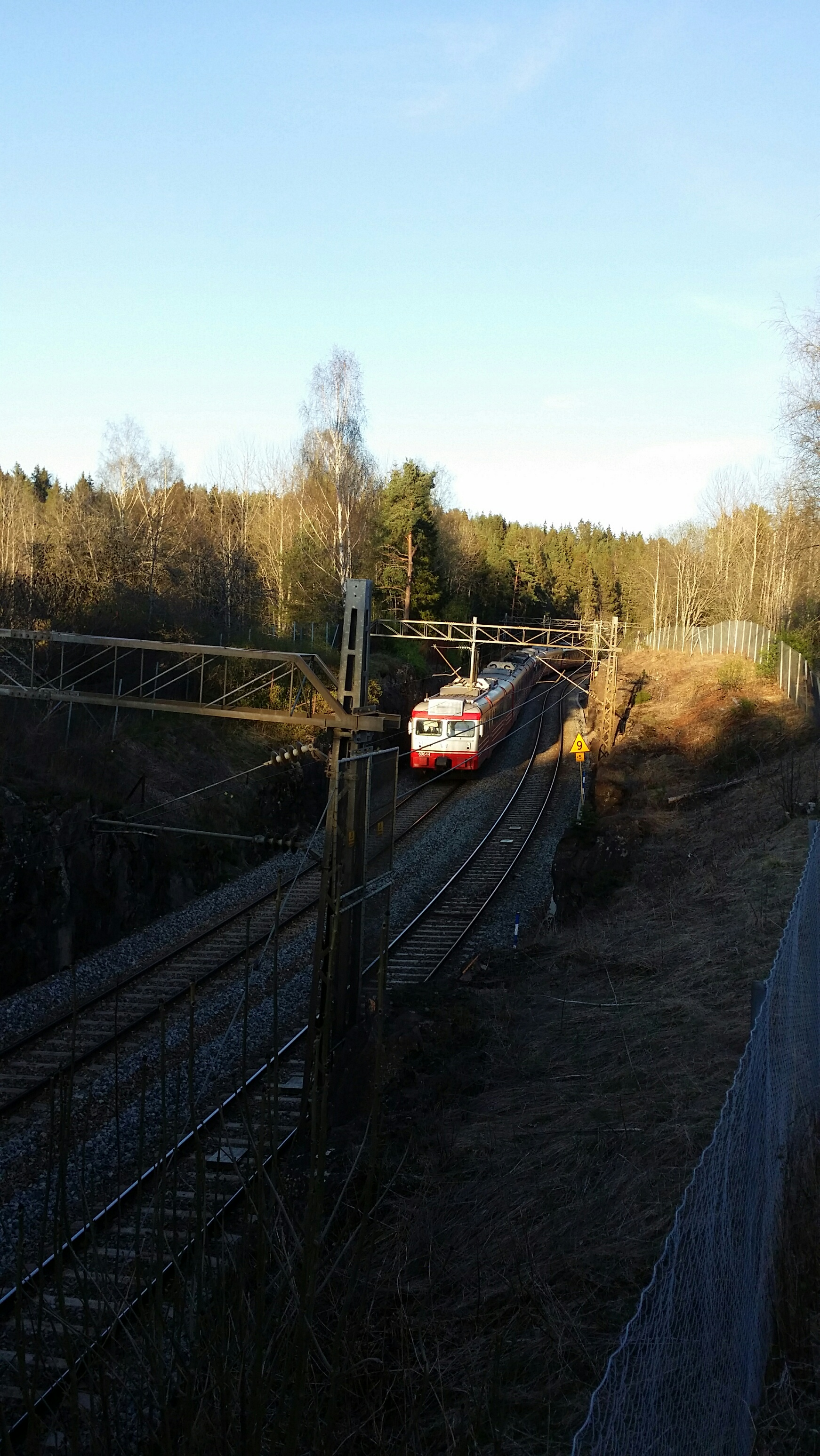 Mellom Oppegård og Langhus går banen gjennom flere kurver og skjæringer.